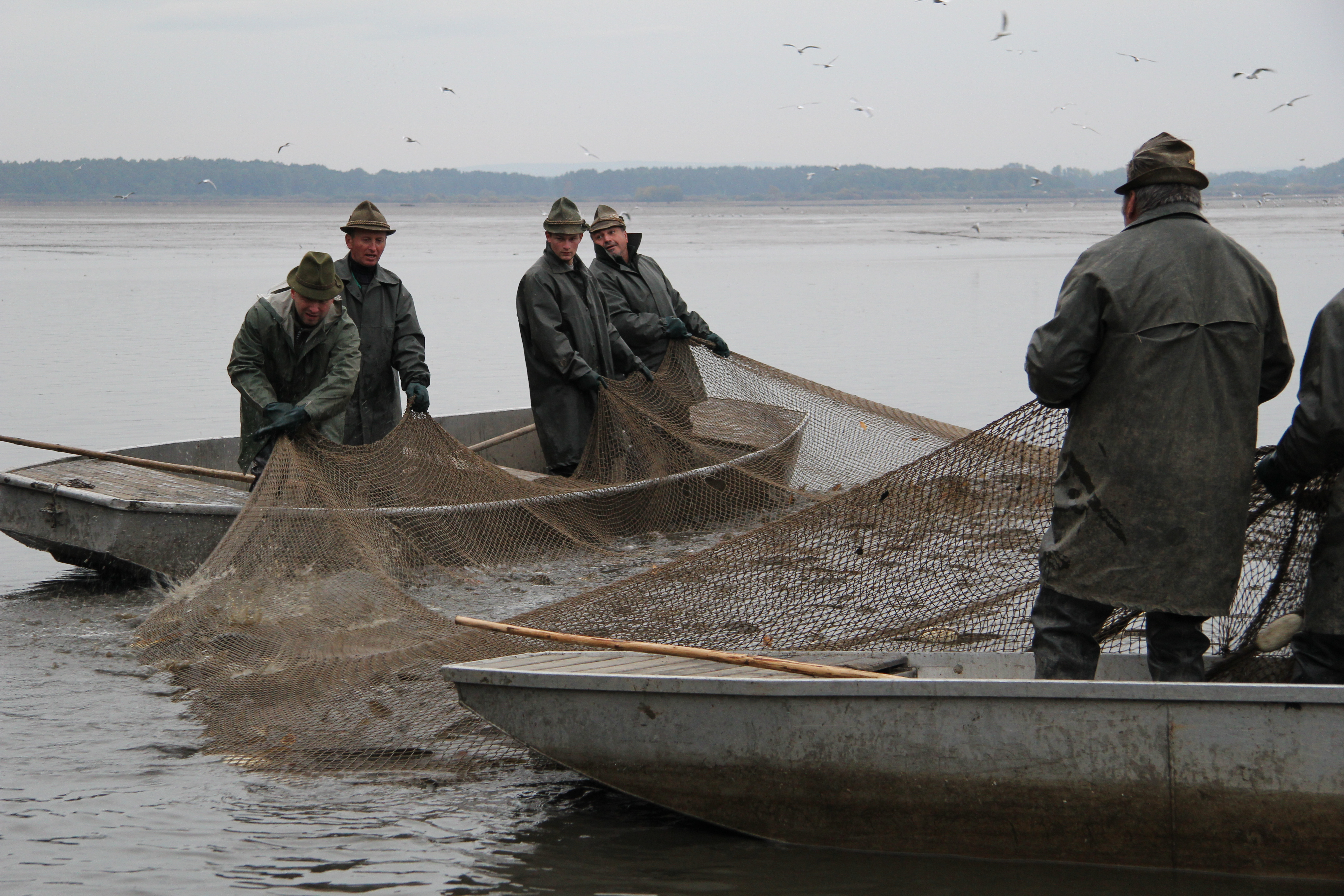 Výlov Rožmberka 2015